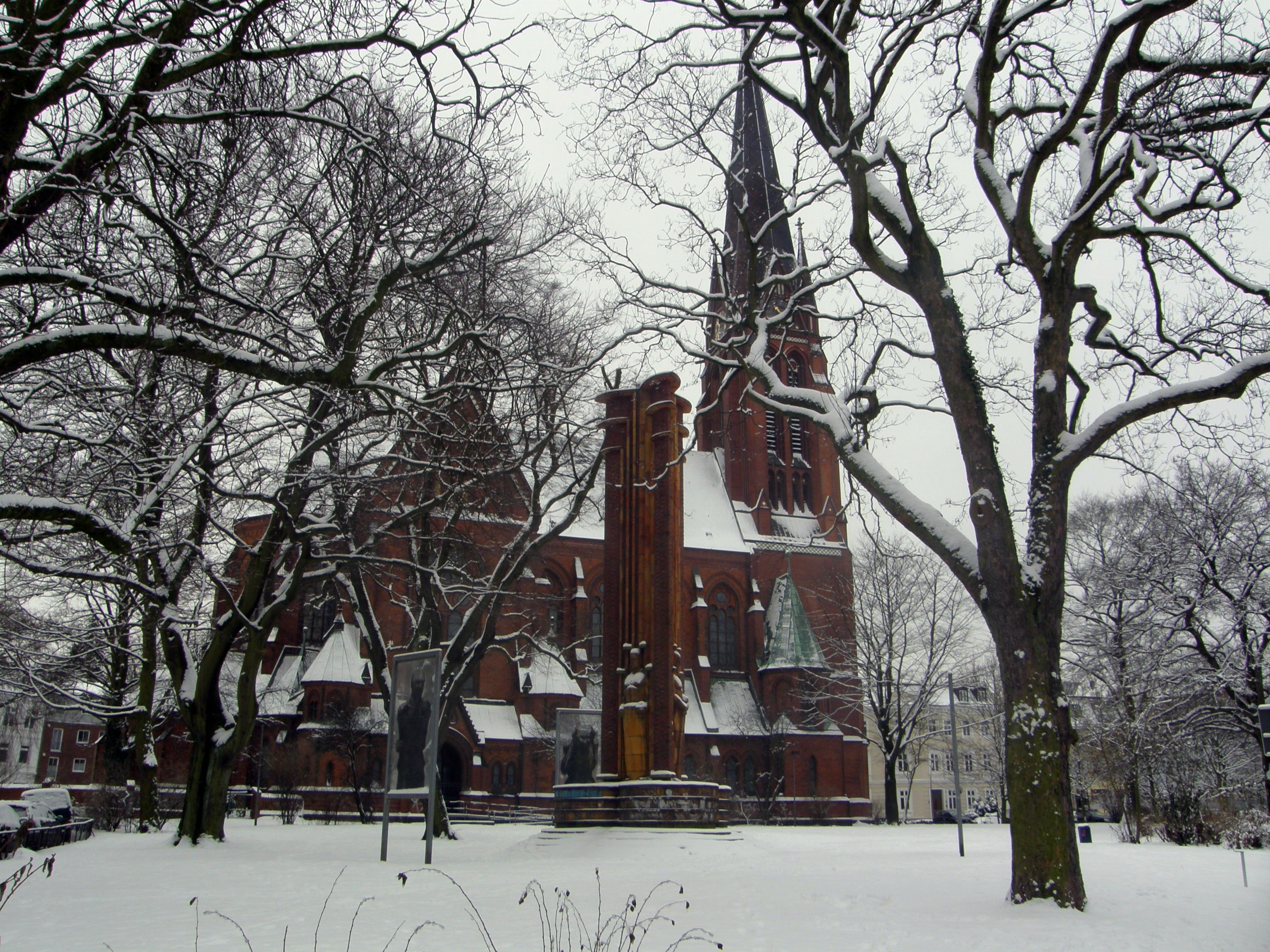 Johanniskirche in Hamburg Altona This is a photograph of an architectural monument.